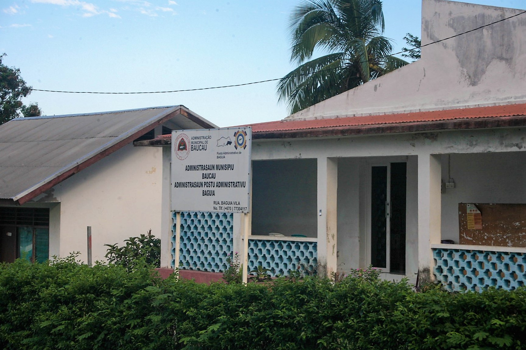 Sitz des Verwaltungsamts von Baguia, Baucau, Osttimor